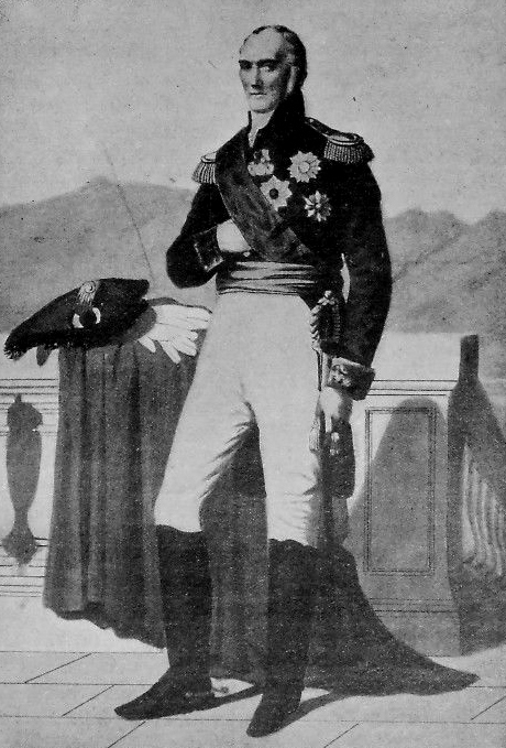 Jean Gabriel Marchand, général et comte de l'Empire (1765-1851). Vétéran des guerres de la Révolution, il est fait général de division en 1805 et participe à la guerre d'Espagne. Il défend également la ligne des Alpes en 1814 et s'oppose au retour de Napoléon l'année suivante.